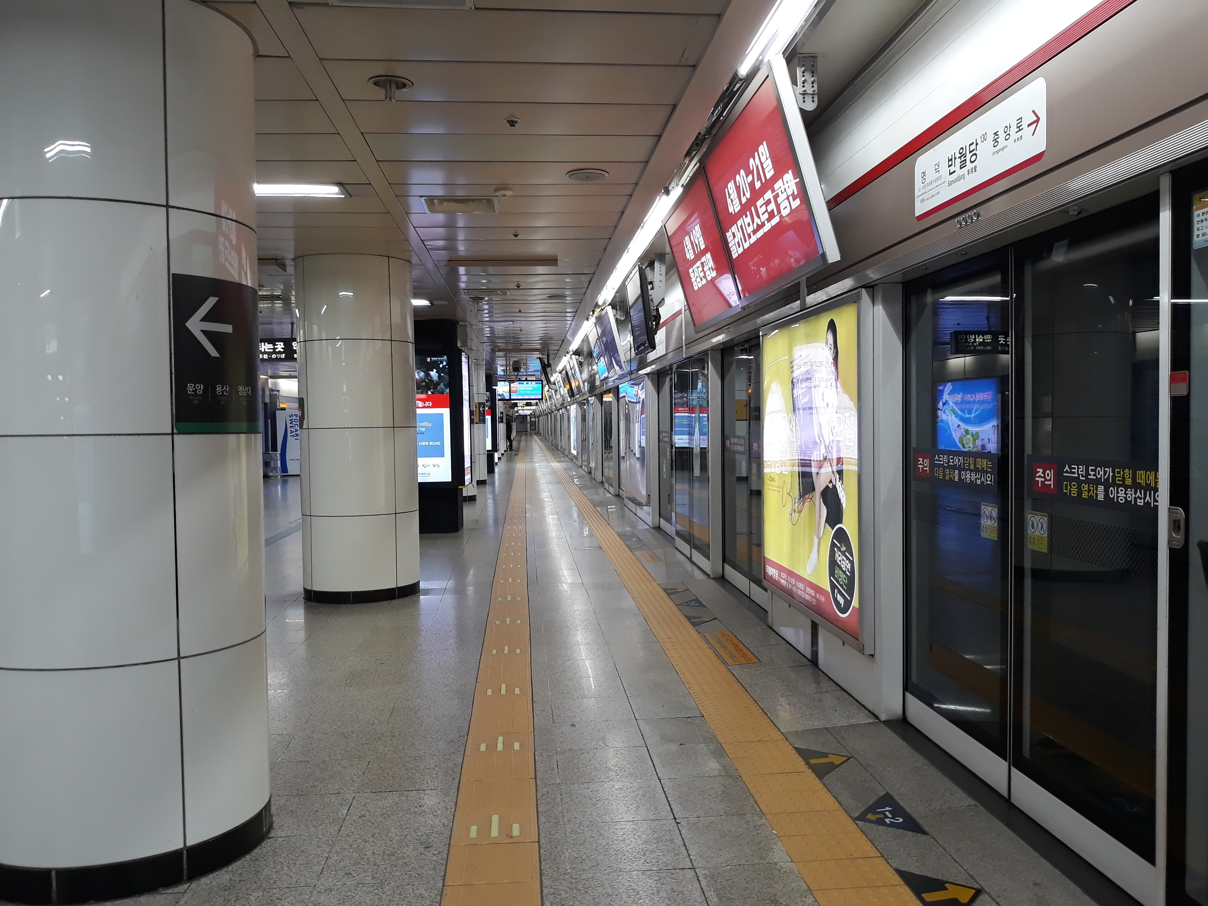 대구 도시철도 1호선 반월당역 안심 방면 승강장